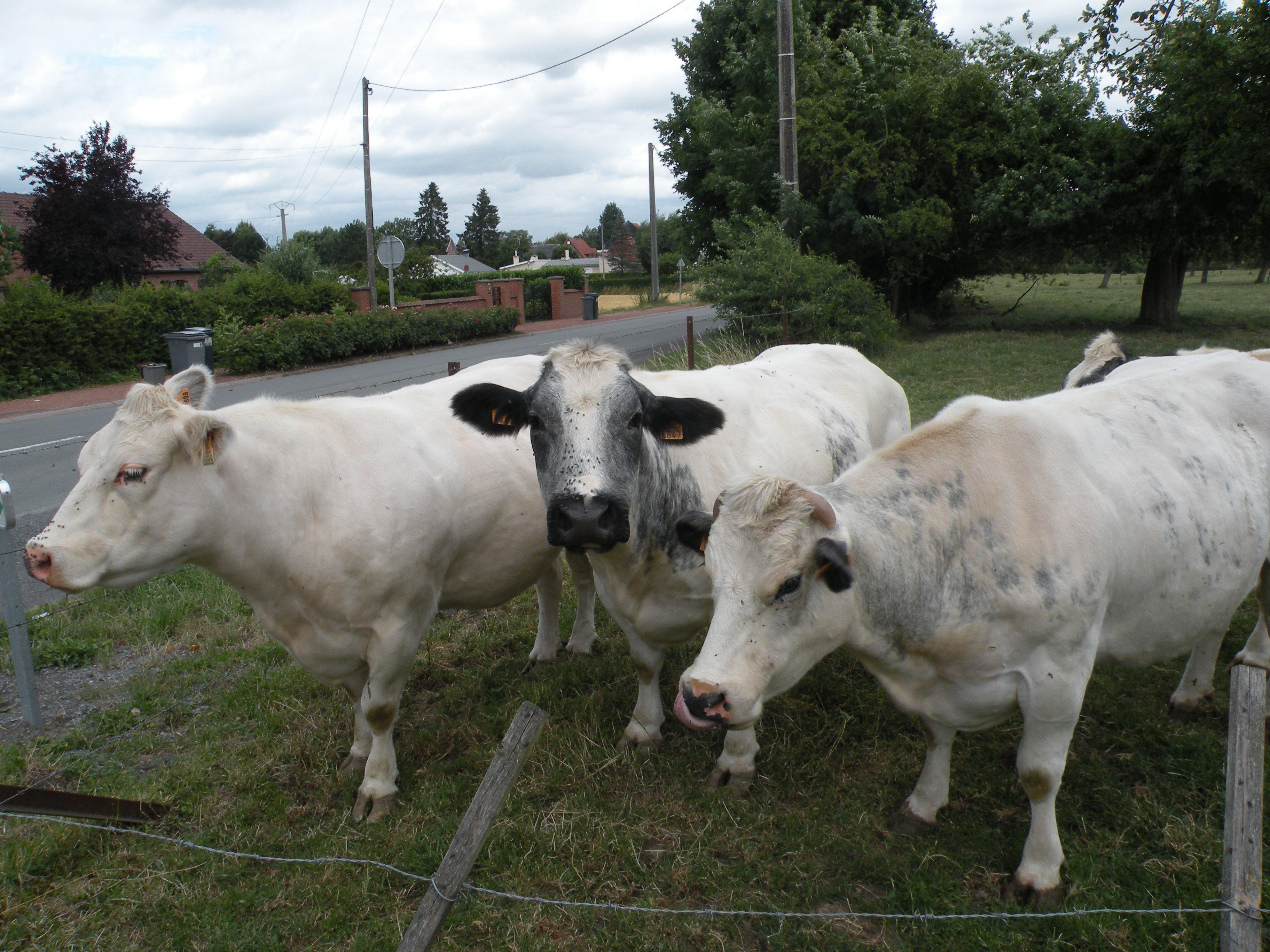 vache bleu